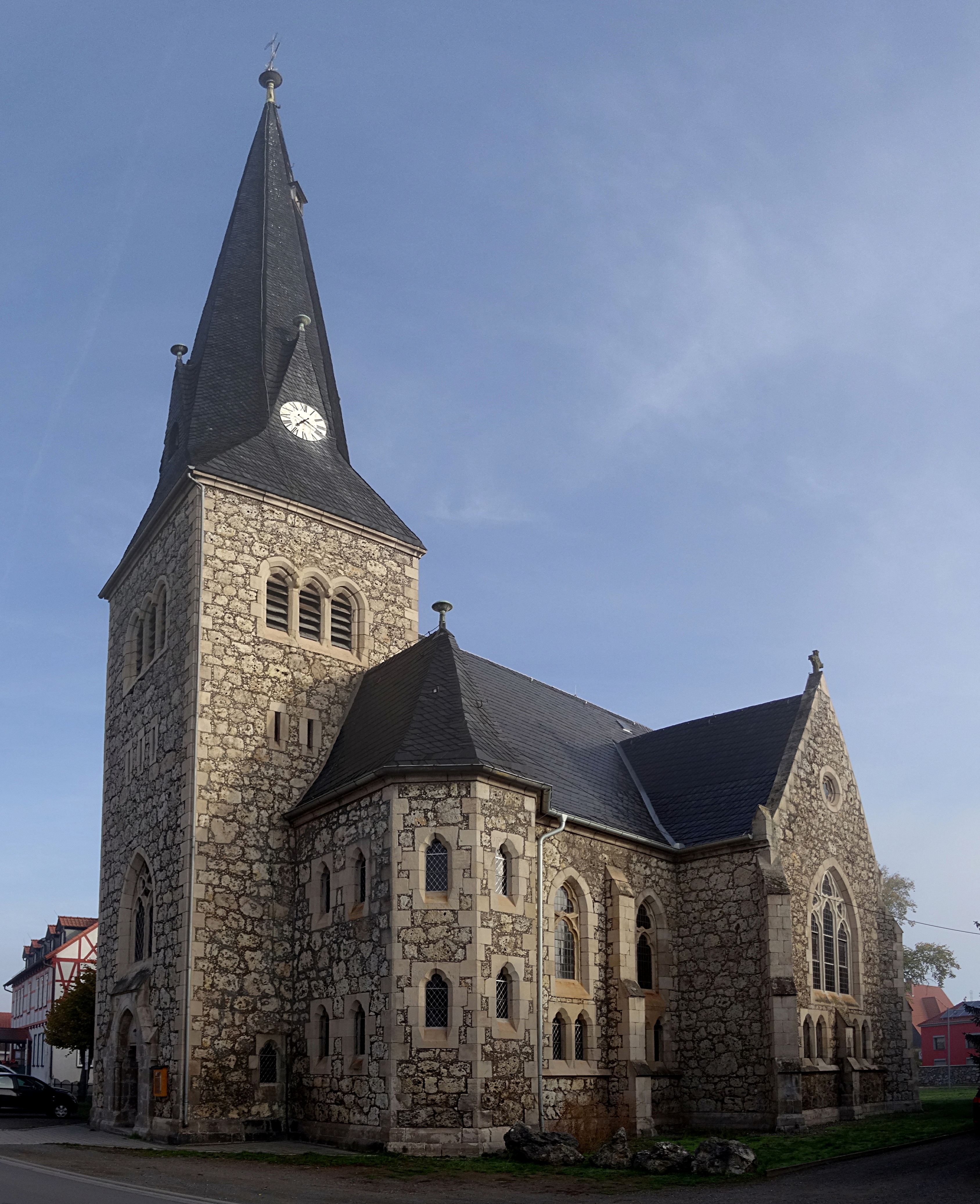 neugotische Johannis-Pauli-Kirche (Niedersachswerfen) von Südwesten